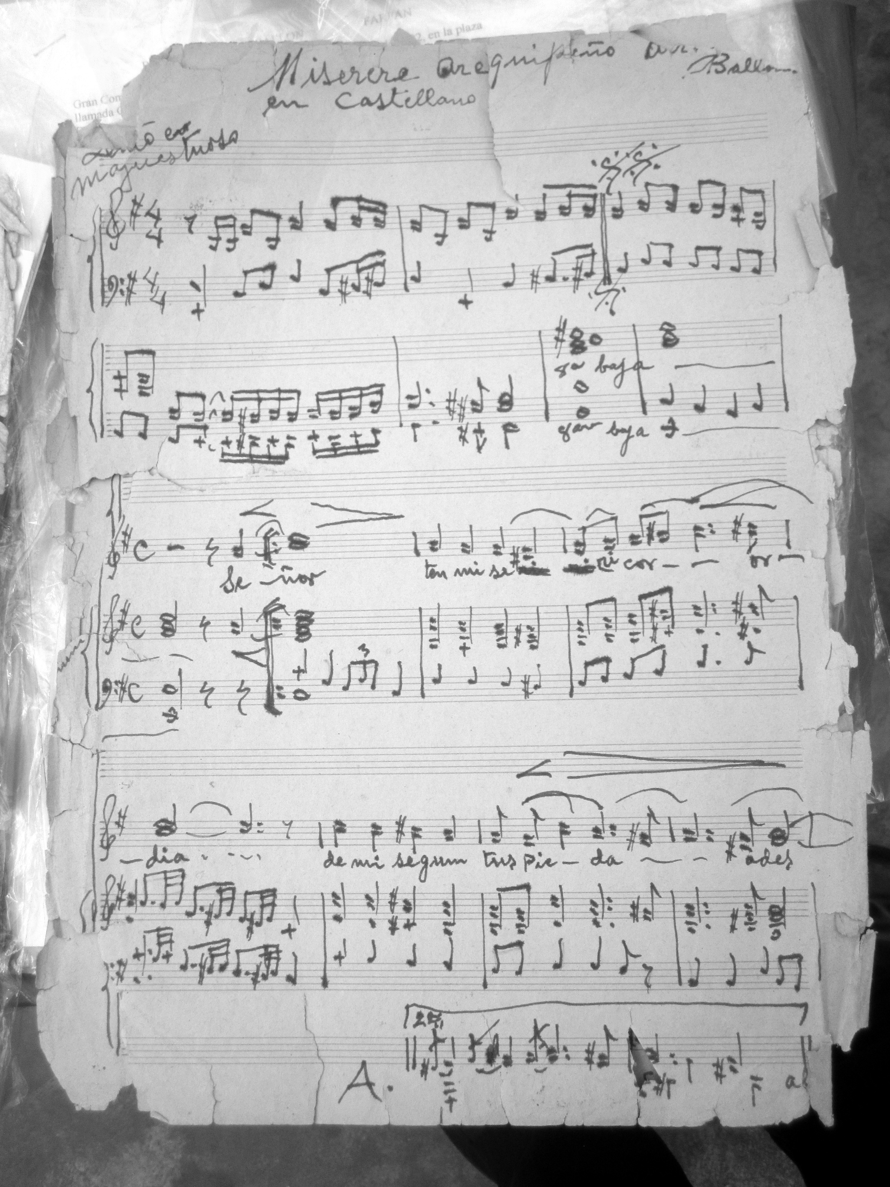 Paritura del Miserere de Benigno Ballón Farfán